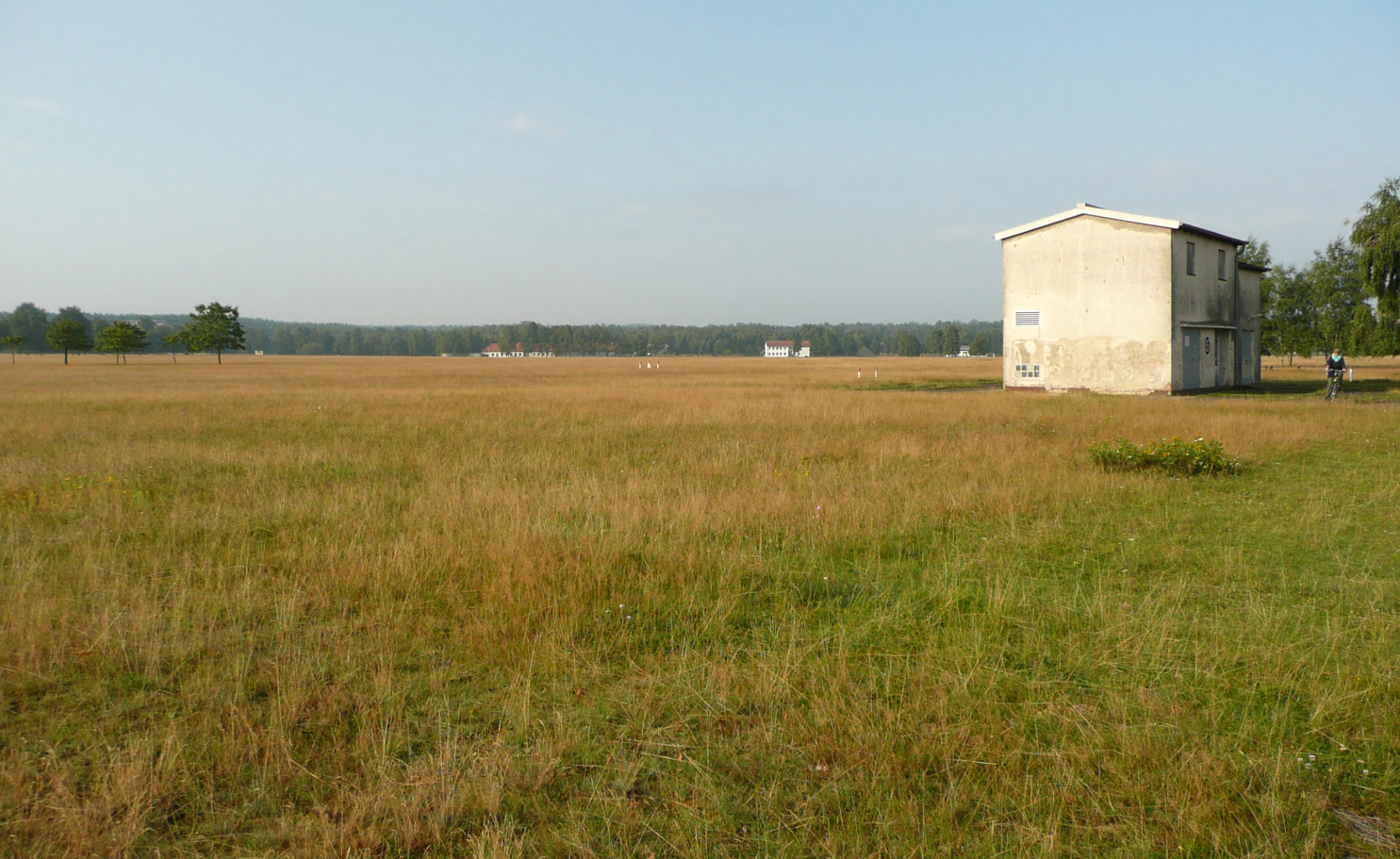 Camp Reinsehlen, Blick vom Trafogebäude in Richtung Gebäude des Camps